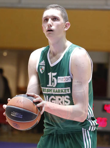 Laurynas Birutis